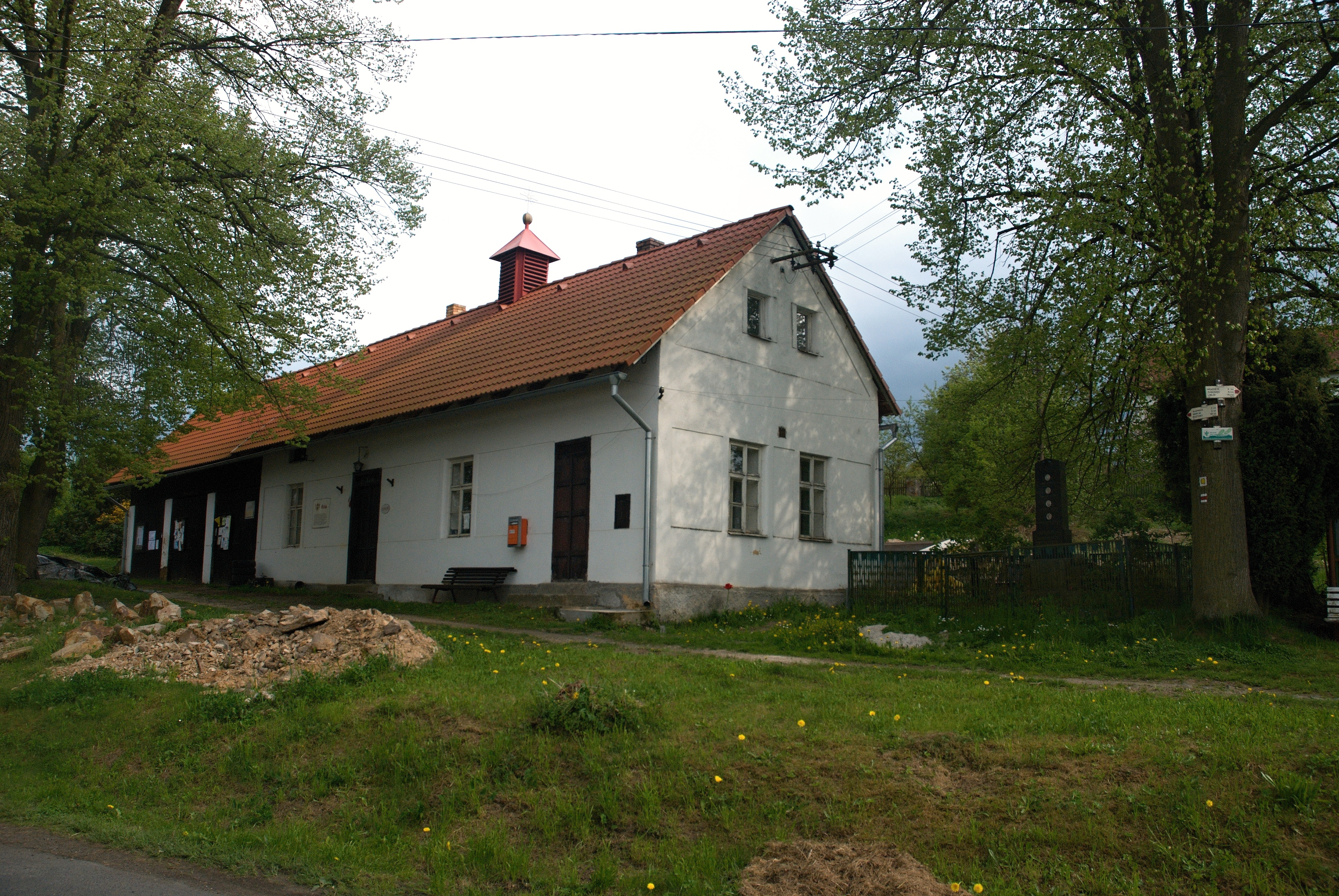 Obecní úřad